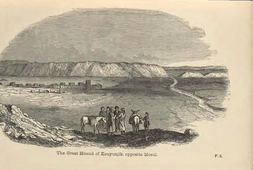 Die großen Hügel von Konyunjik gegenüber von Mossul